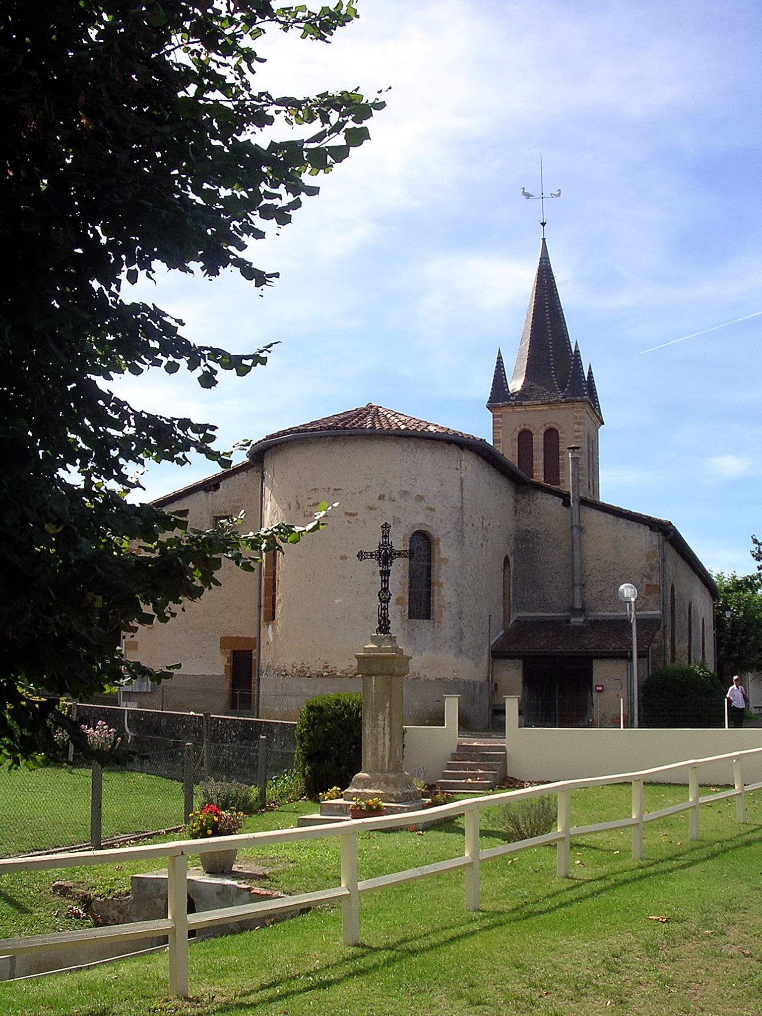 Église et fontaine Saint-Pantaléon de la commune de Campagne, dans le département français des Landes